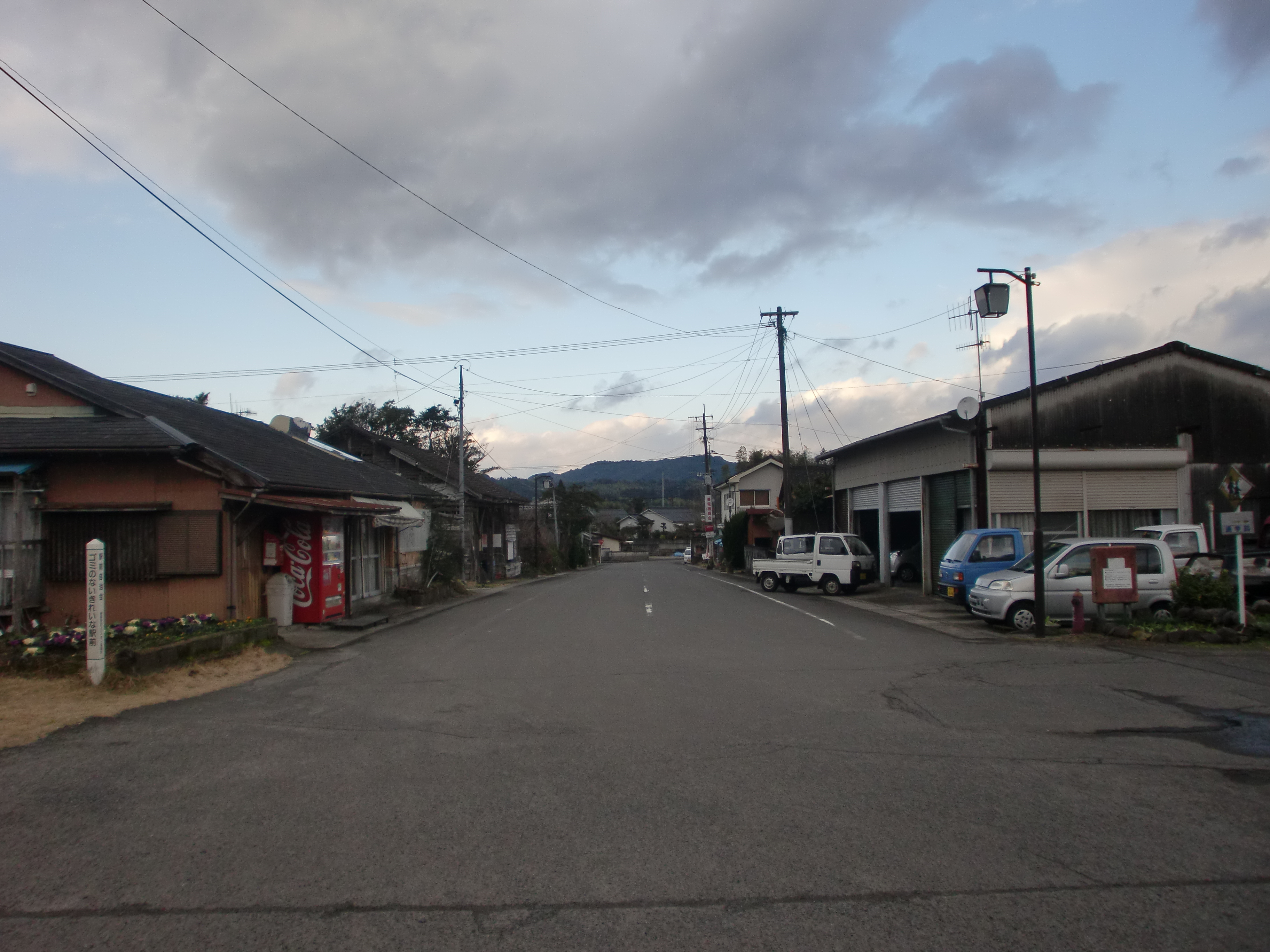 かつての鹿児島県道343号樋脇停車場線を樋脇駅跡から県道335号方面に望む。